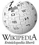 Logo al Wikipediei în aromână